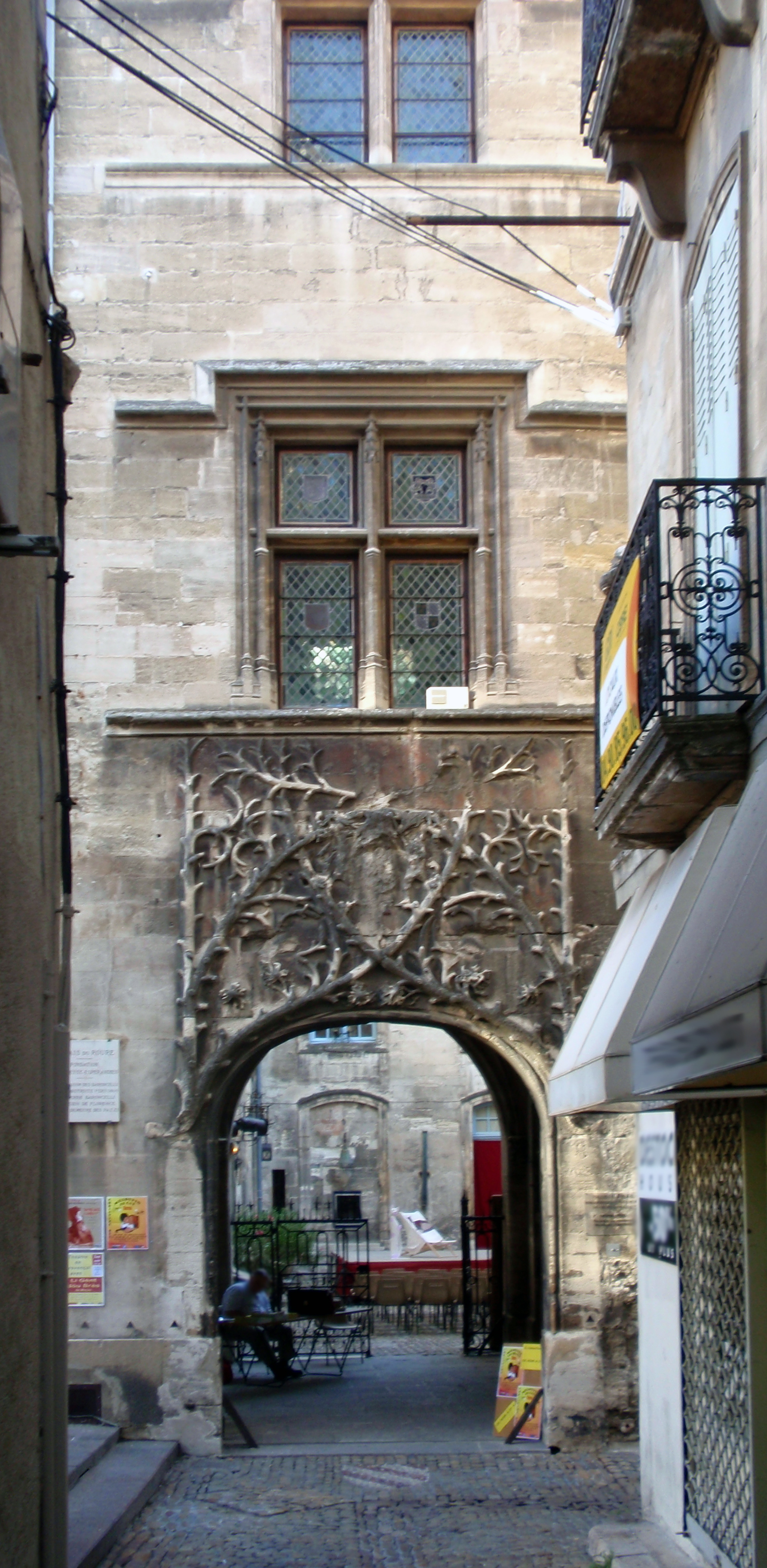 Palais du Roure, Avignon, Vaucluse, France.